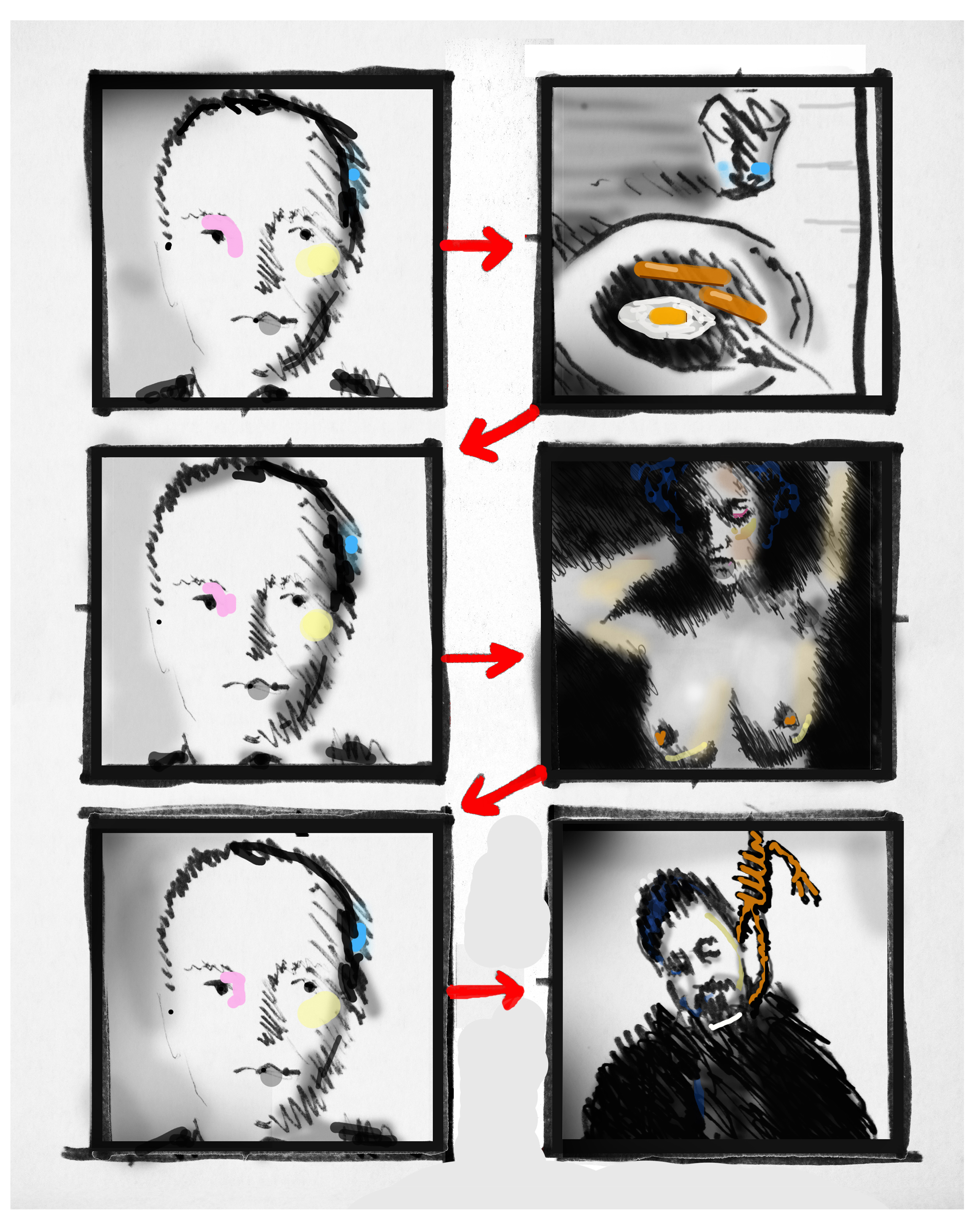 Efecto Kuleshov